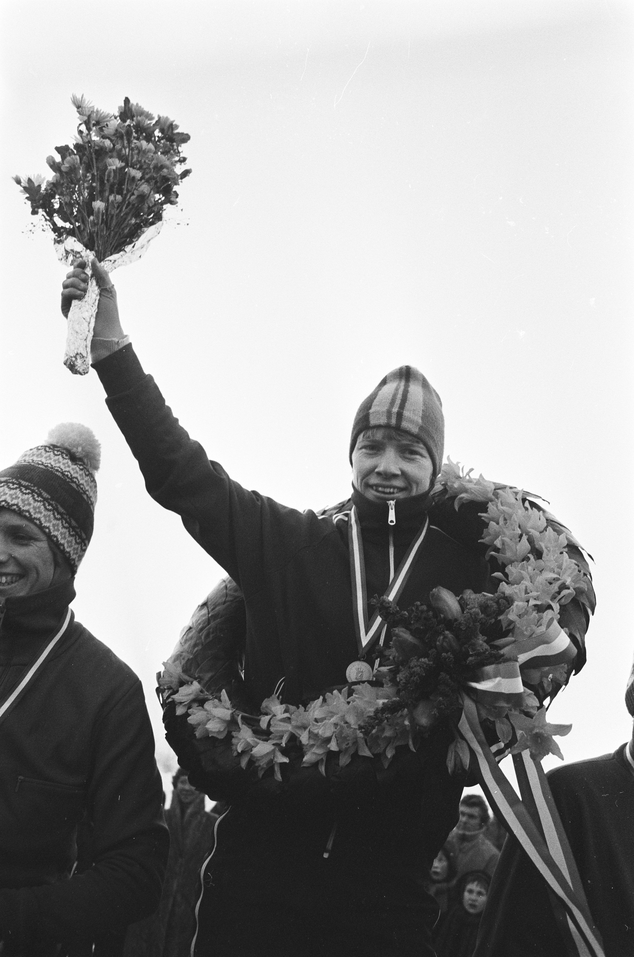 Collectie / Archief : Fotocollectie Anefo Reportage / Serie : [ onbekend ] Beschrijving : Kampioene schaatsen dames korte baan Anneke Zeinstra tijdens huldiging Datum : 6 januari 1979 Trefwoorden : huldigingen, schaatsen, sport Persoonsnaam : Zeinstra Anneke Fotograaf : Bogaerts, Rob / Anefo Auteursrechthebbende : Nationaal Archief Materiaalsoort : Negatief (zwart/wit) Nummer archiefinventaris : bekijk toegang 2.24.01.05 Bestanddeelnummer : 930-0667